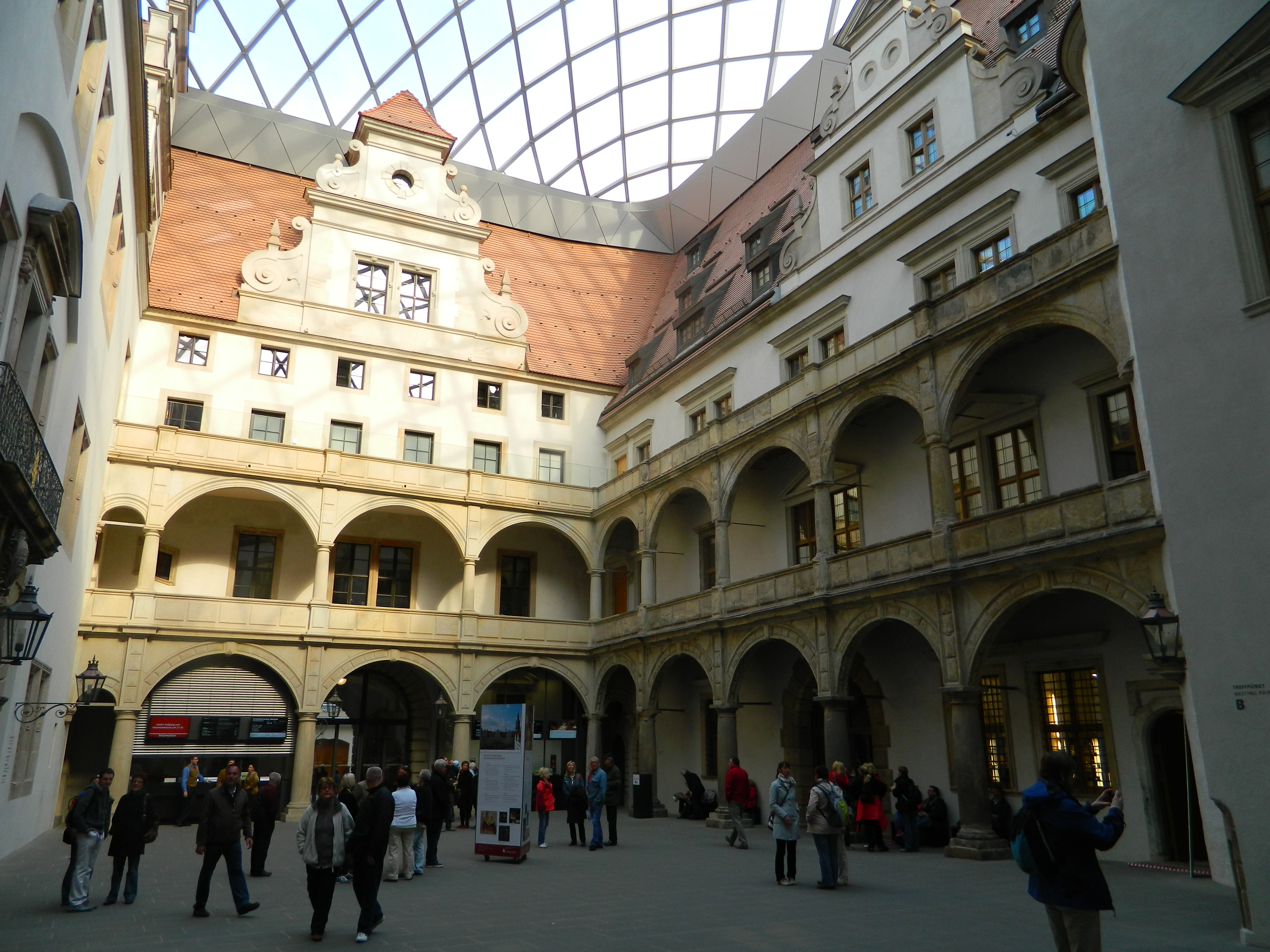 Renaissance